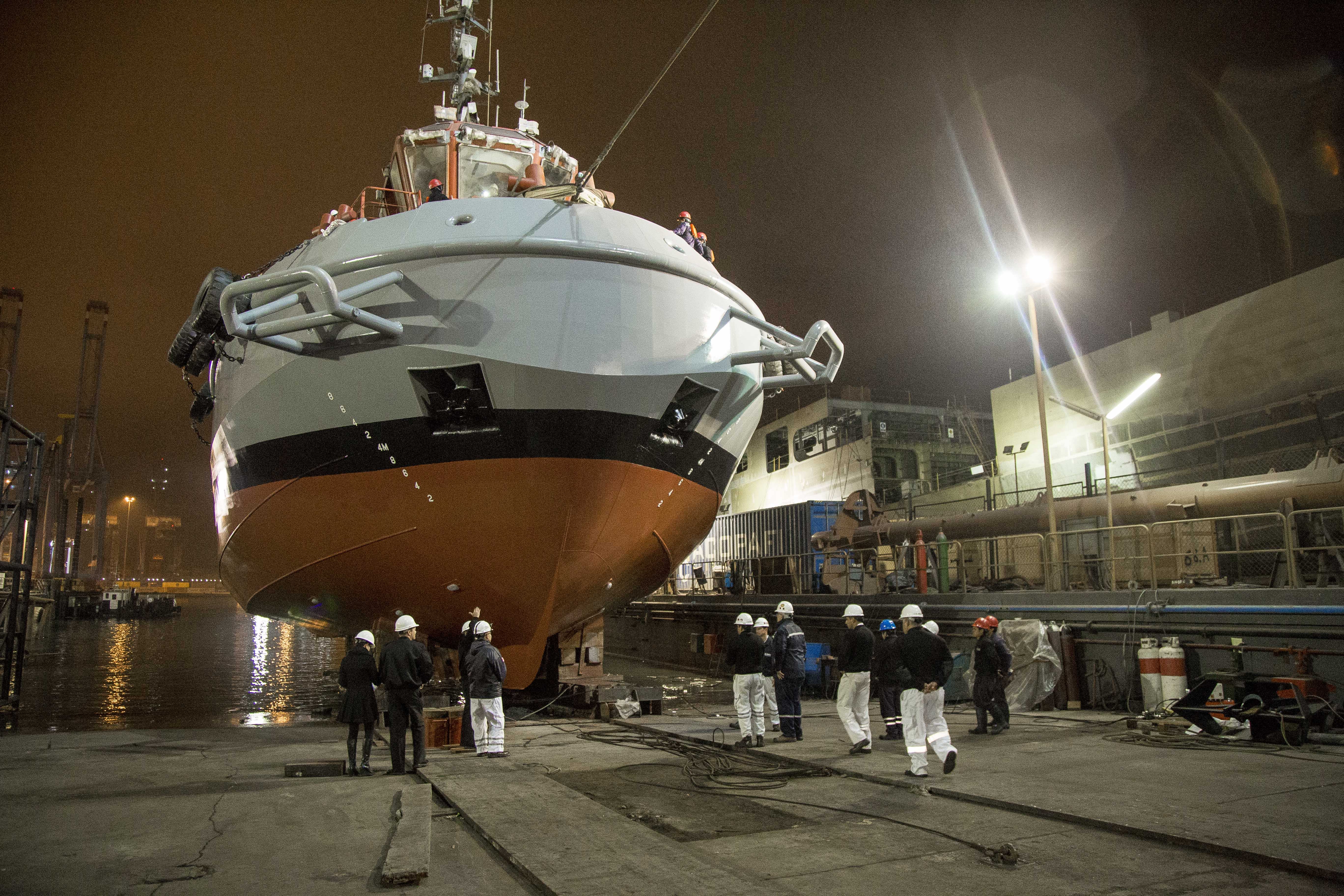 El RAS, el primero de su clase, ha sido íntegramente diseñado y construido en el centro de operació de SIMA Callao.